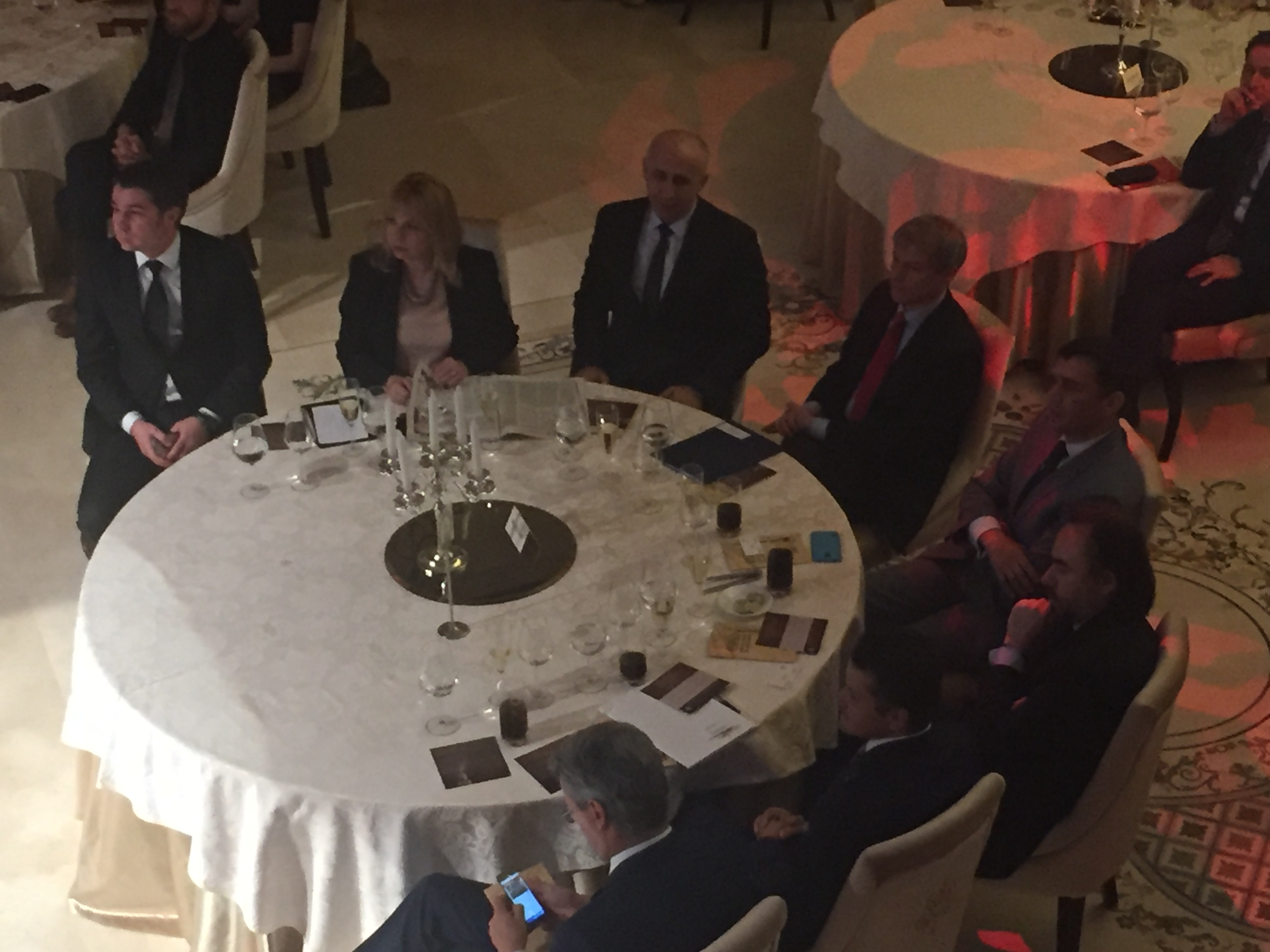 Gala premiilor Capital